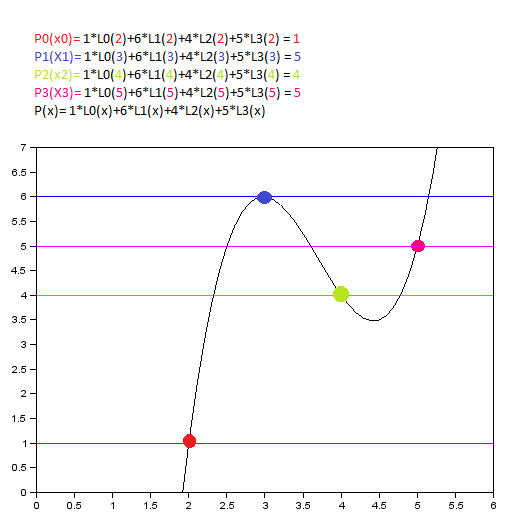 Representação do Pn polinomios de Lagrange